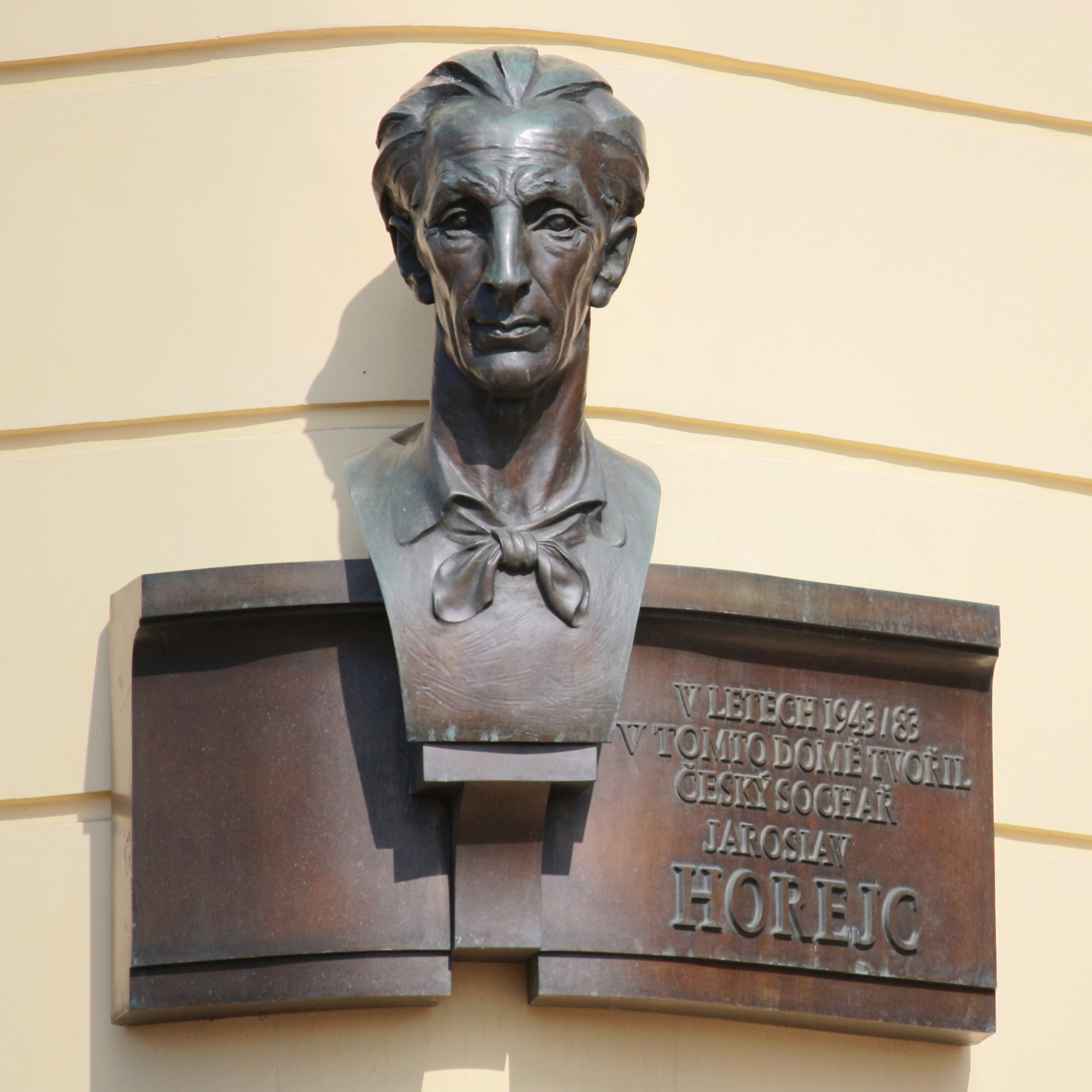 Praha, Nové Město - Pamětní deska s bustou sochaře Jaroslava Horejce na rohu Rašínova nábřeží a Trojické